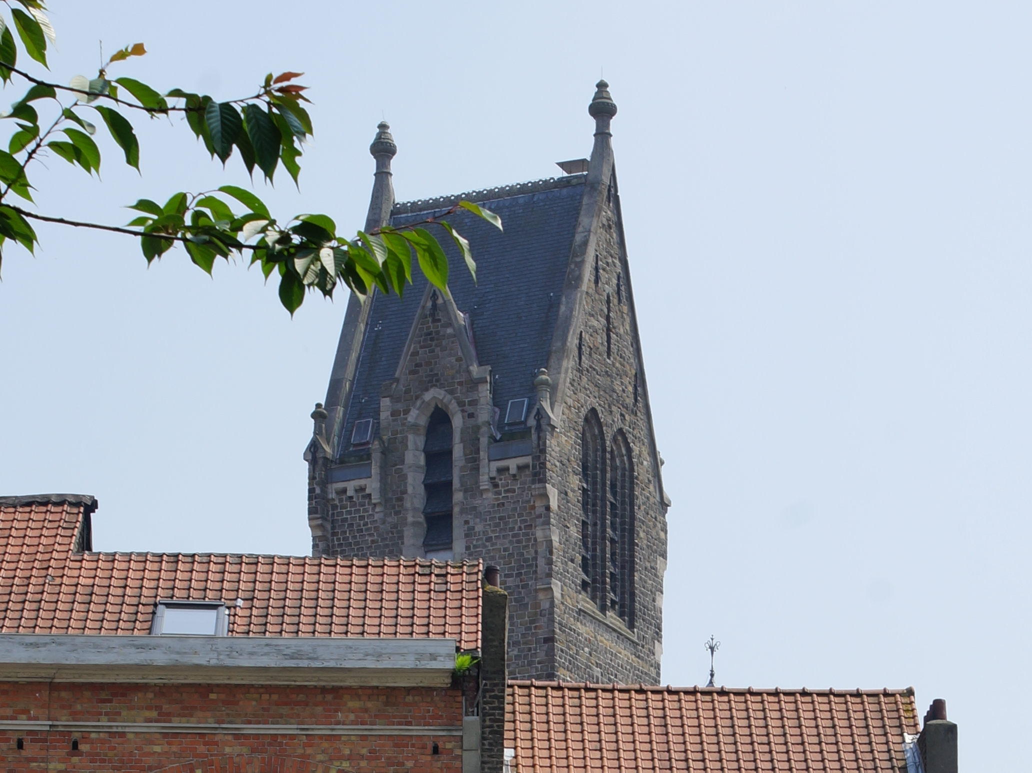 Karakteristieke torenspits van de Sint-Albertuskerk te Schaarbeek.